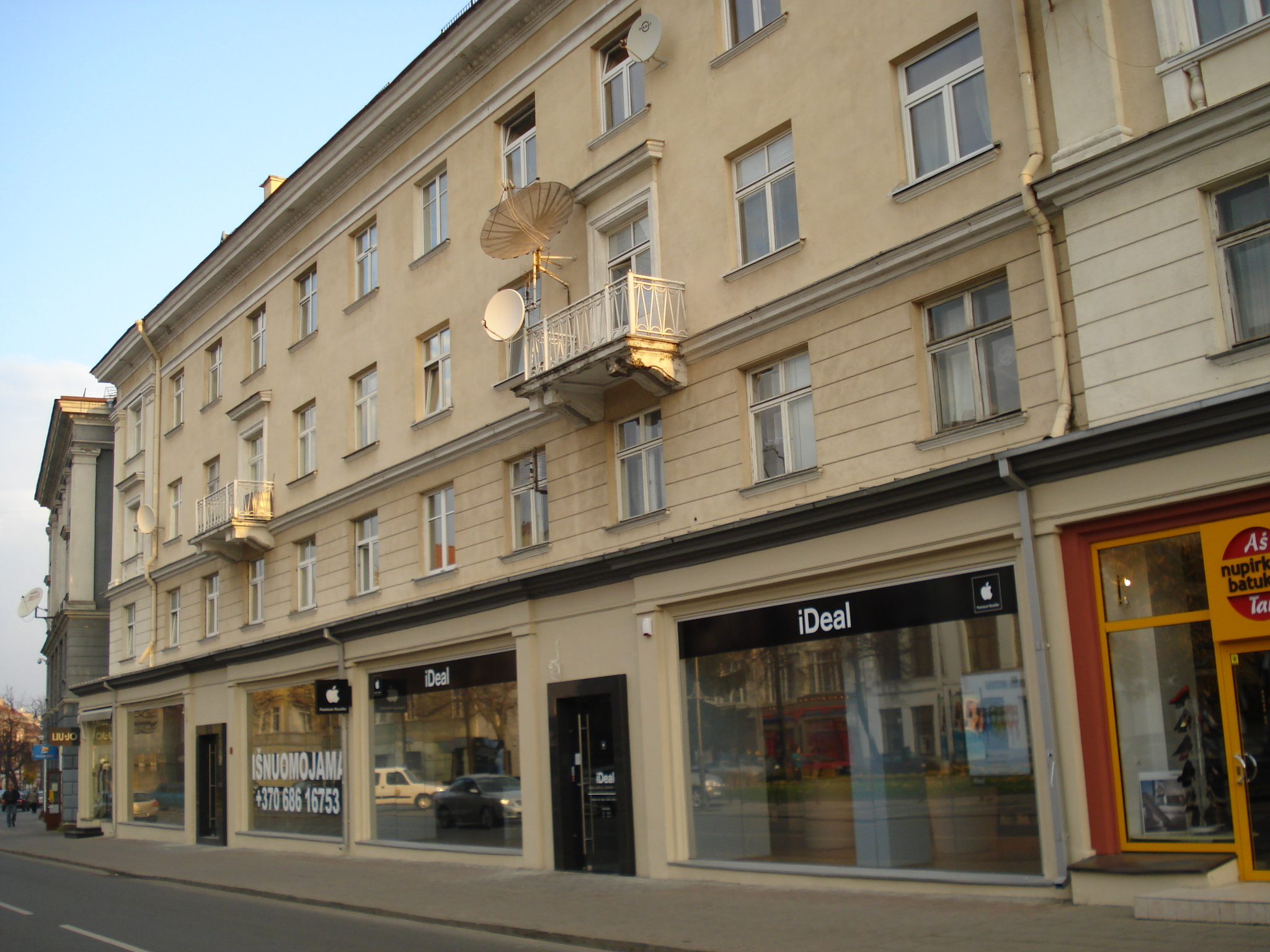 House in Vokiečių street in Vilnius (Vokiečių g. 3). Built after WWII